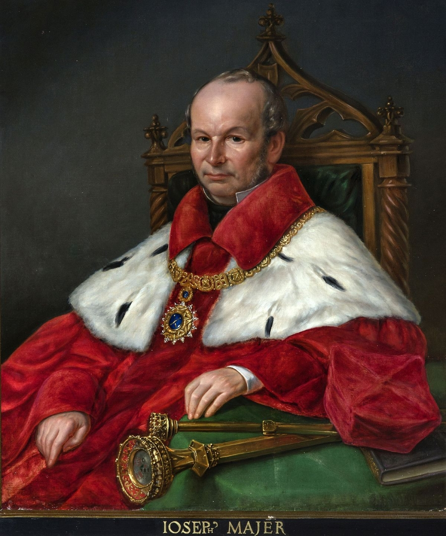 Józef Majer rektor UJ